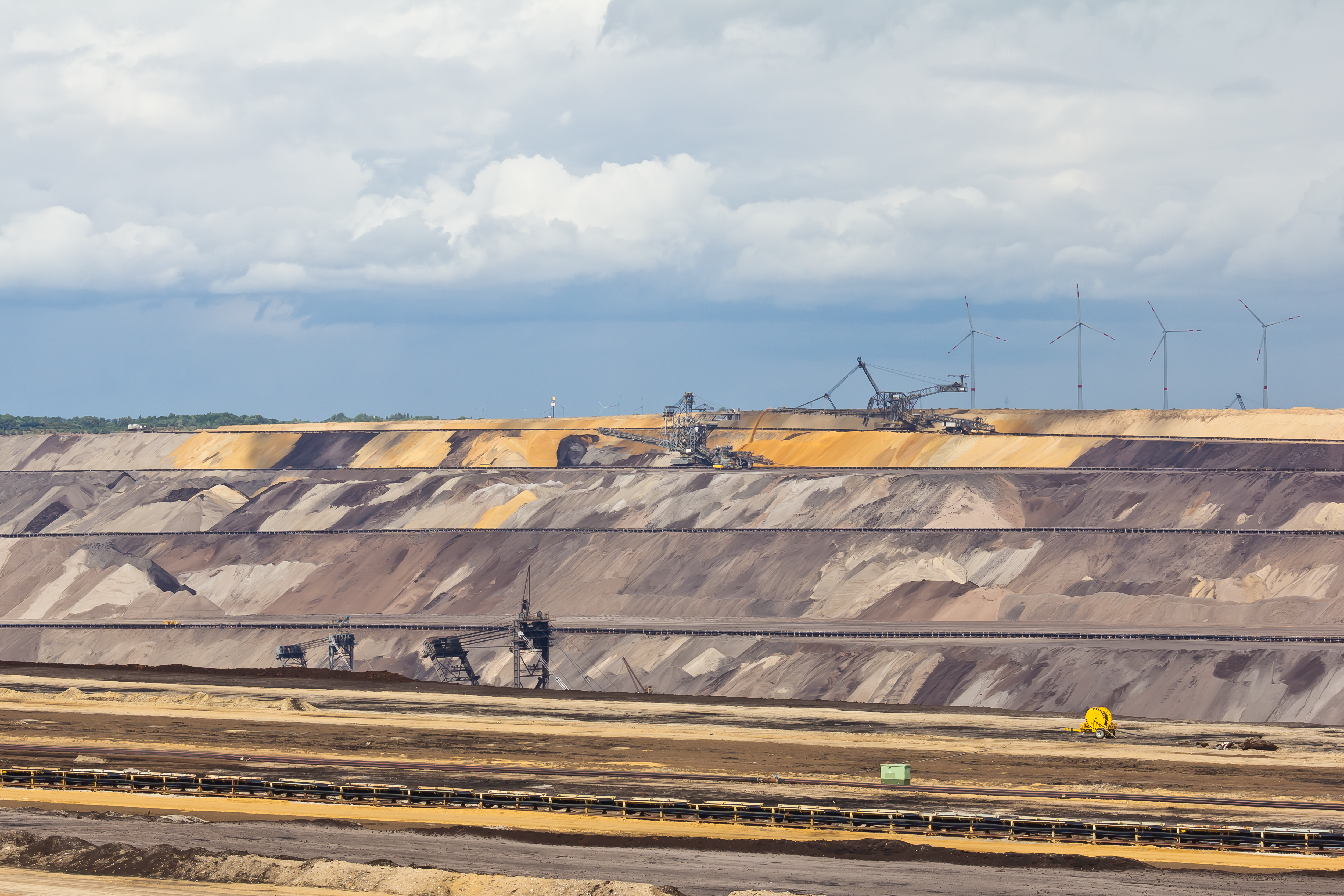 Tagebau Garzweiler, hinten zwei Absetzer (rechts Absetzer 742)